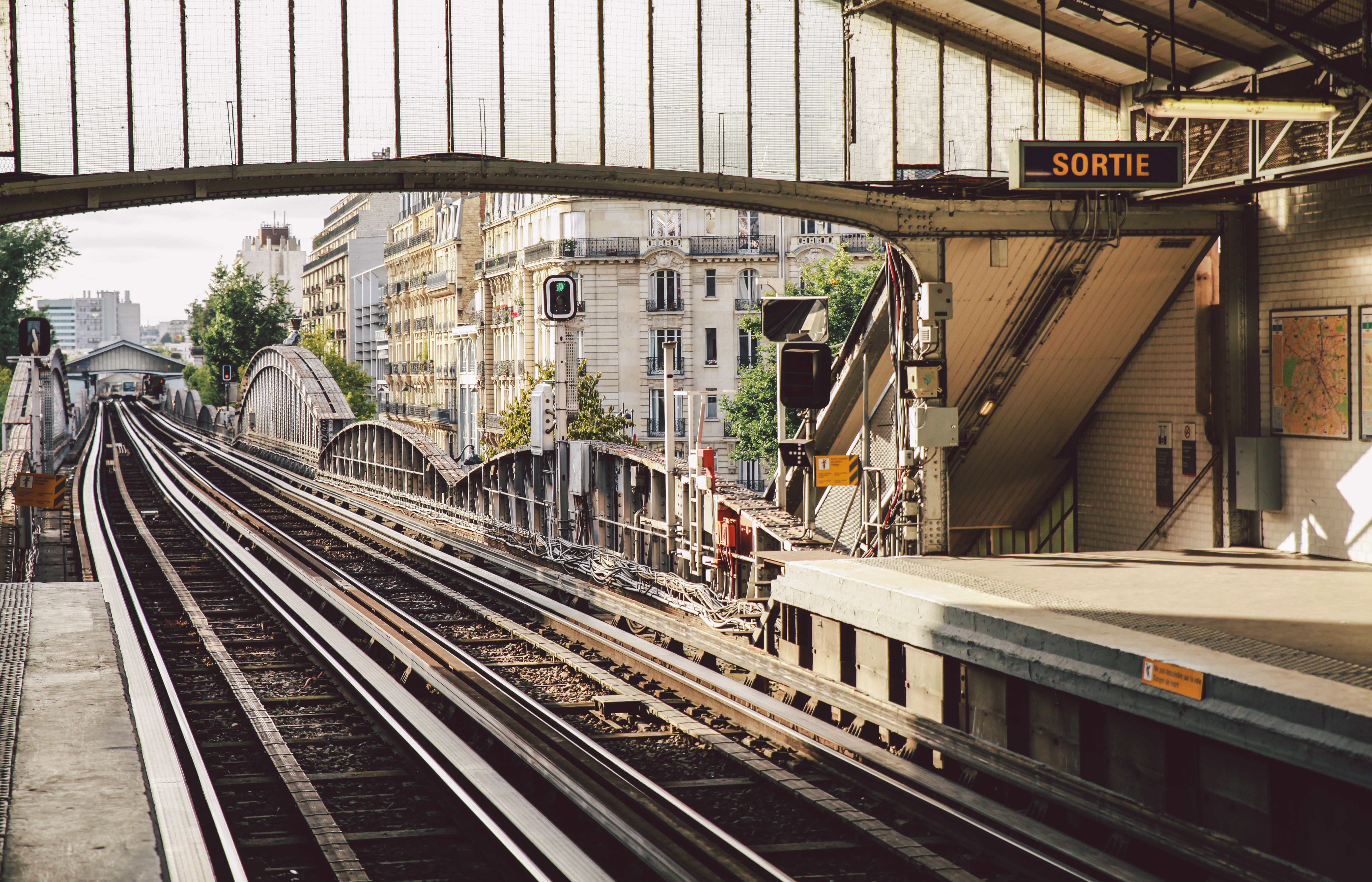 Cambronne Metro station, Paris.